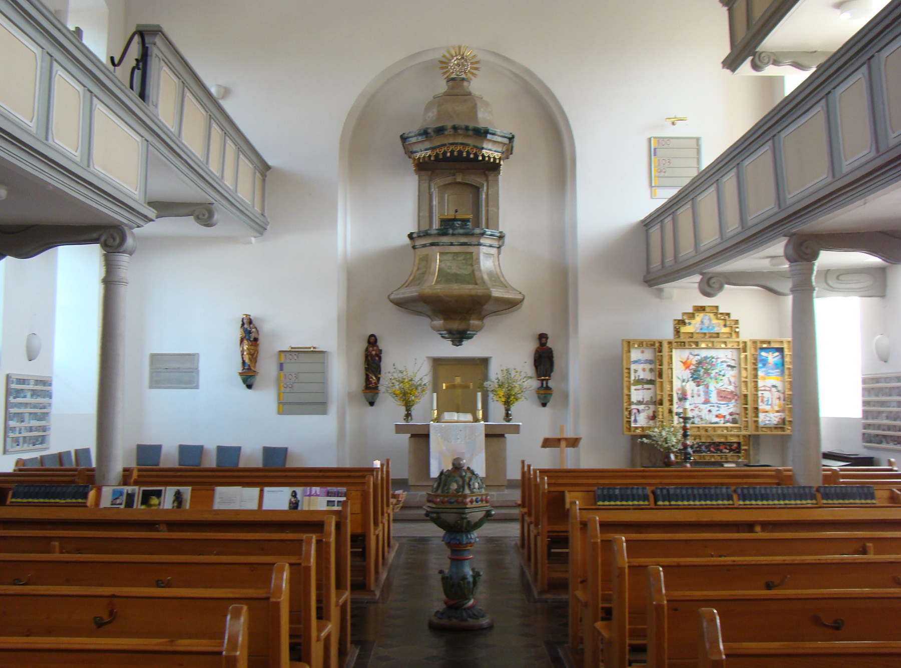 Wendelinskirche in Obersulm-Eschenau